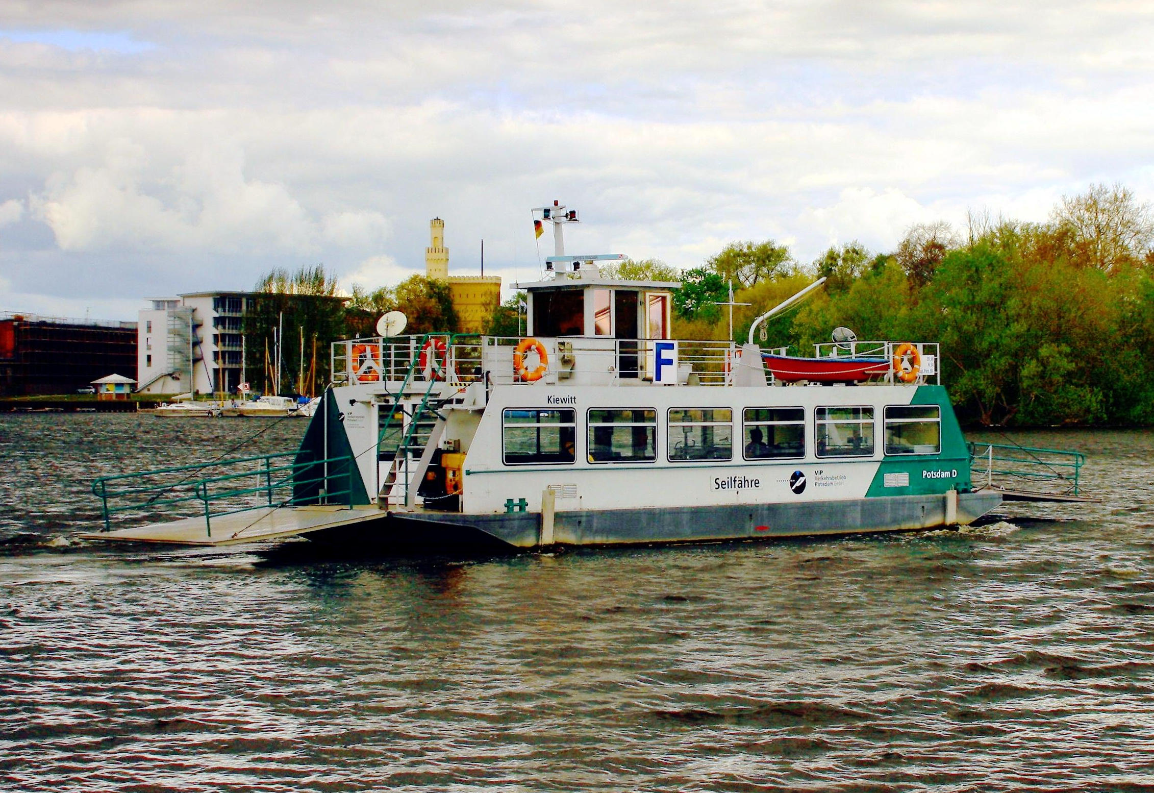 Potsdam, Havelfähre zwischen Kiewitt und Hermannswerder